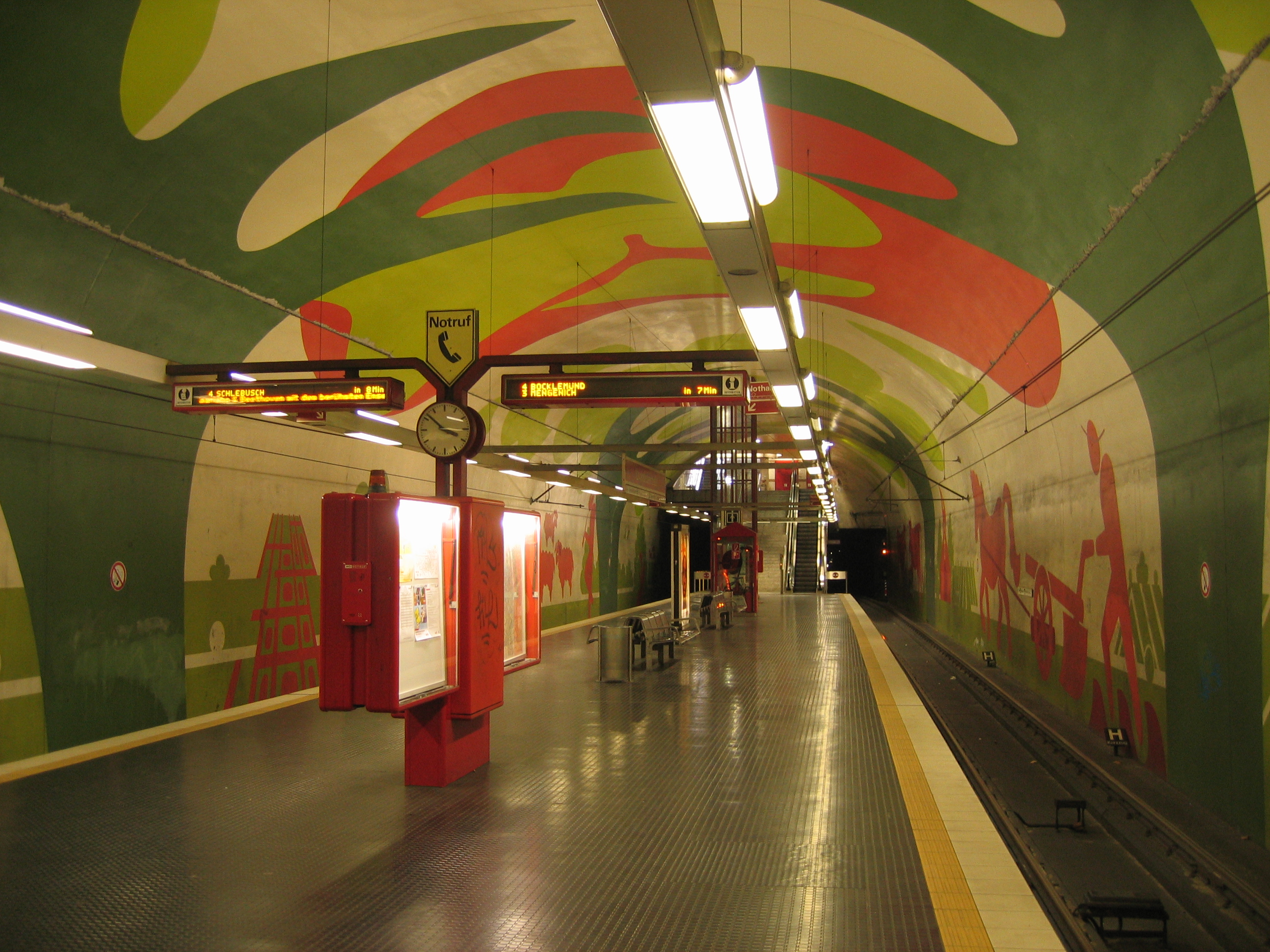 U-Bahn-Station Leyendeckerstraße der Stadtbahn Köln